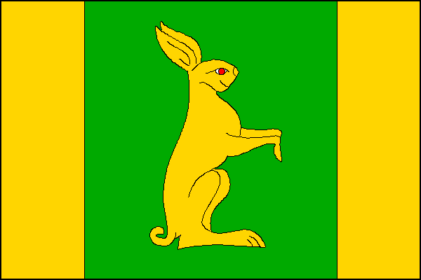 vlajka, Prosiměřice, okres Znojmo